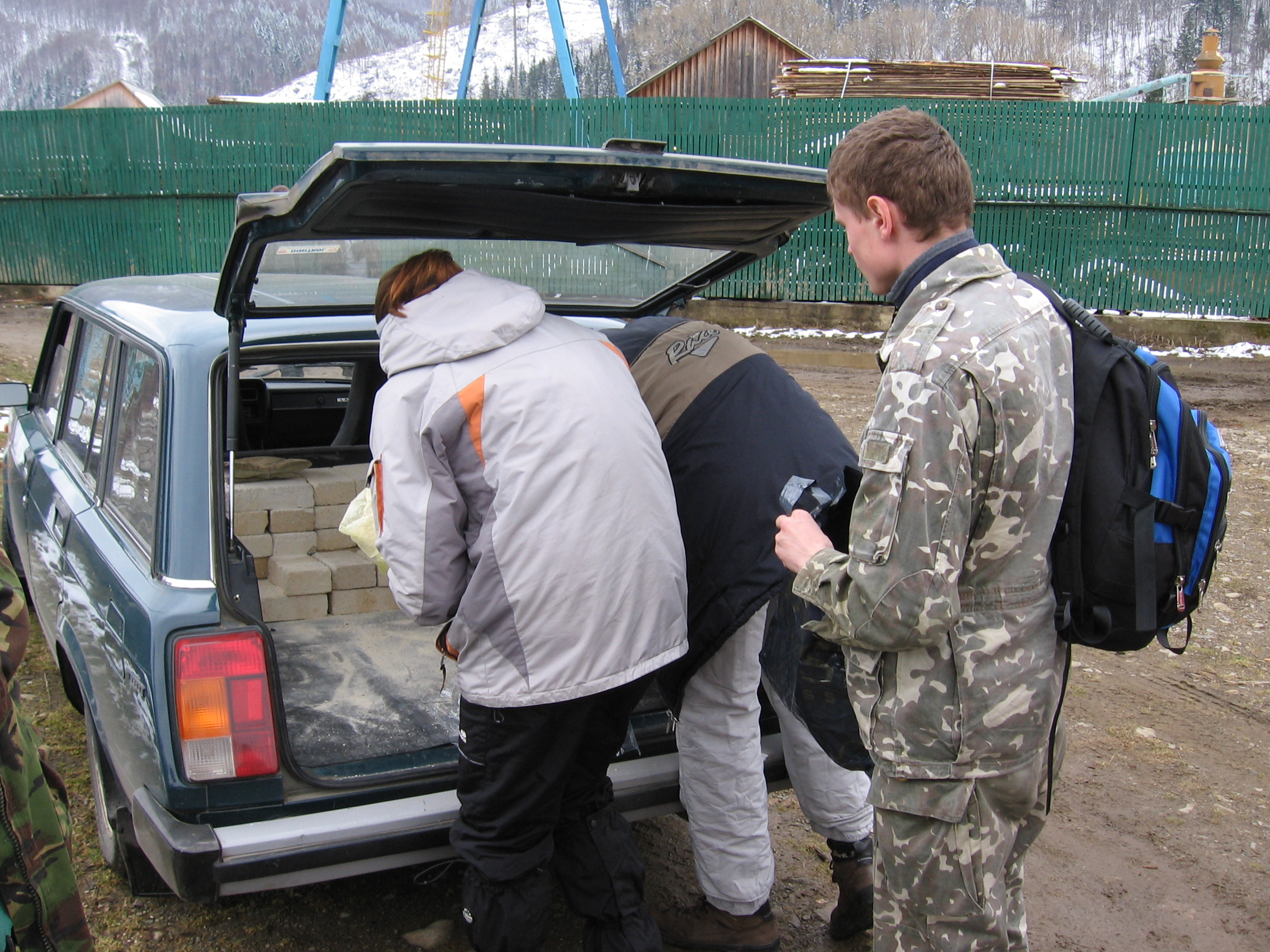 Розвантаження машини